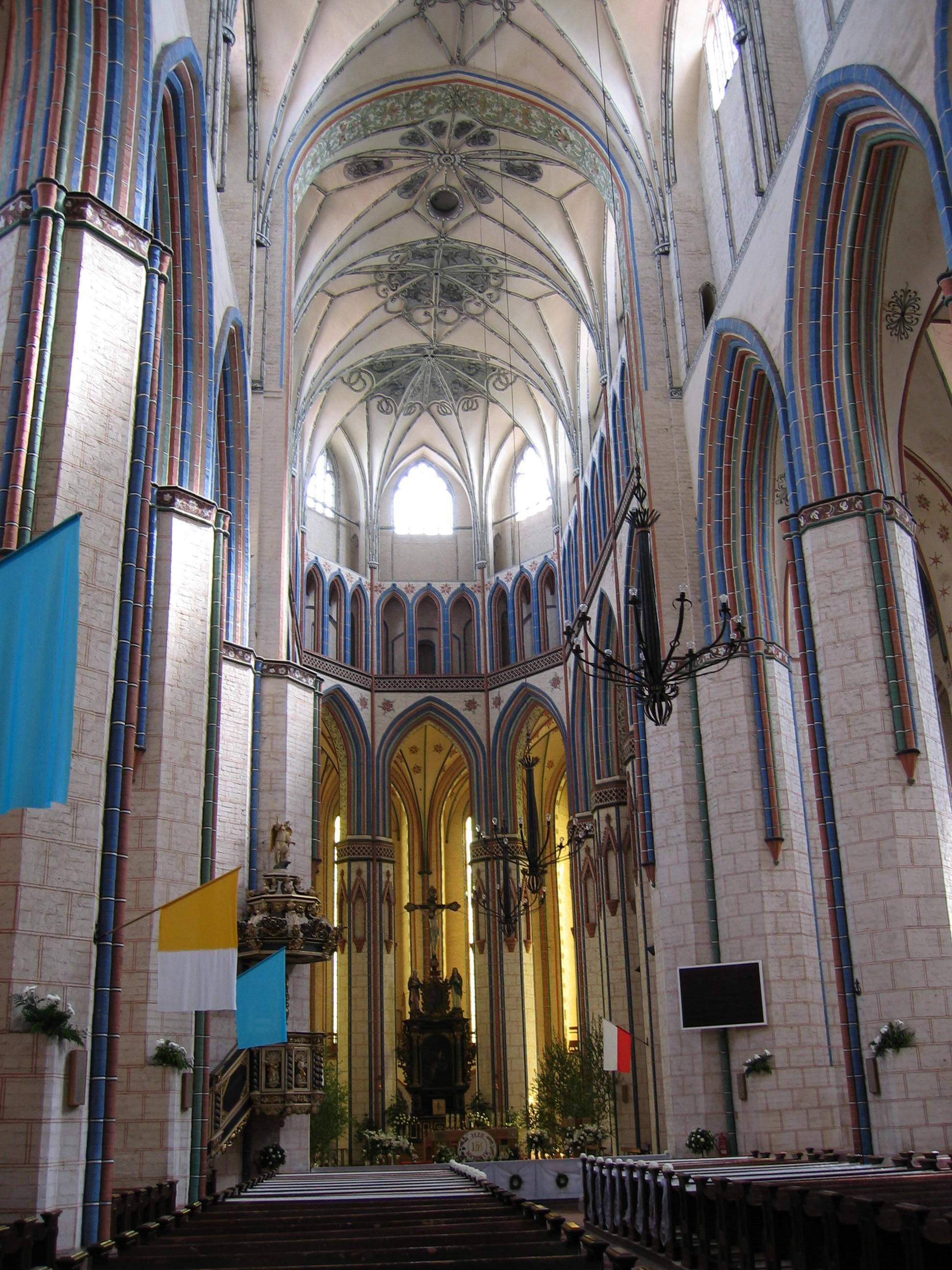 Kolegiata NMP Królowej Świata w Stargardzie - wnętrze